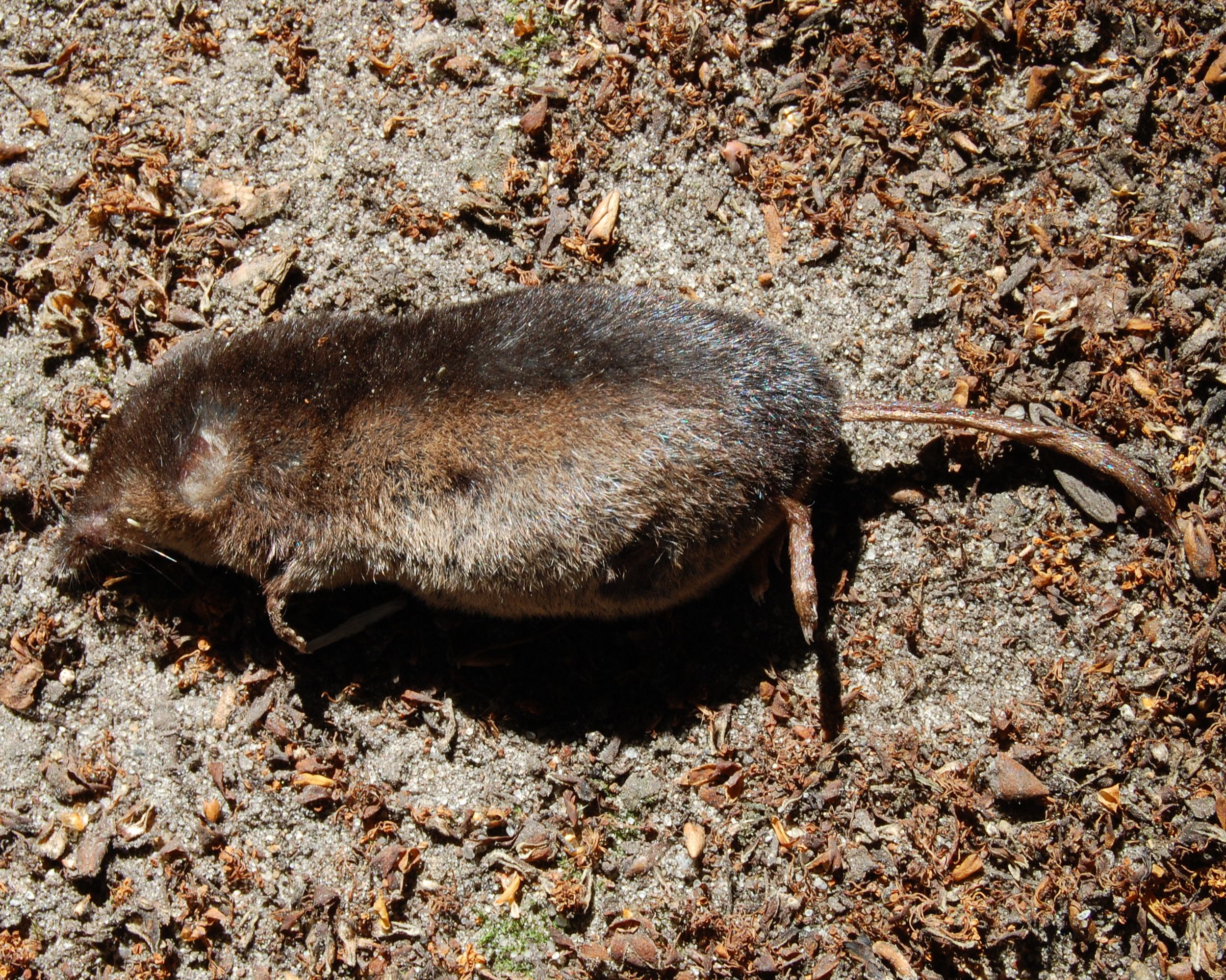 Sorex araneus, adult. Totfund auf Friedhof. Berlin Pankow. Die äußerlich sehr ähnliche Schabrackenspitzmaus kommt in Berlin und Brandenburg bisher nicht vor.